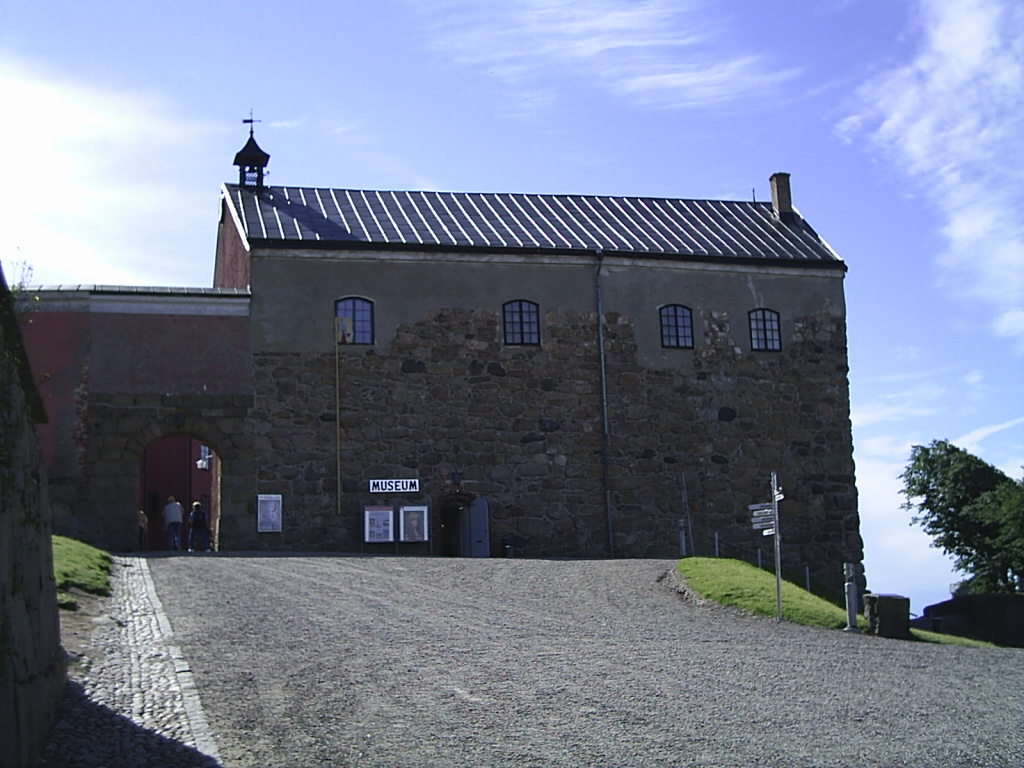 Varbergs museum i Varbergs fästning. Fotograferat 8/8 2005 av Tubaist.